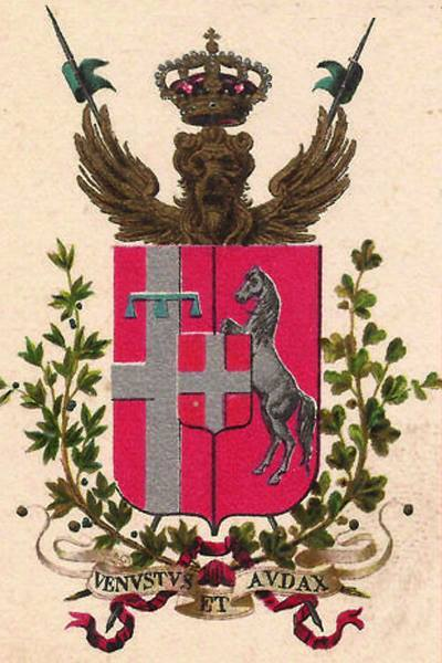 Stemma Araldico di Piemonte Reale Cavalleria come concesso nell'anno 1919, dalla copertina di un calendario reggimentale